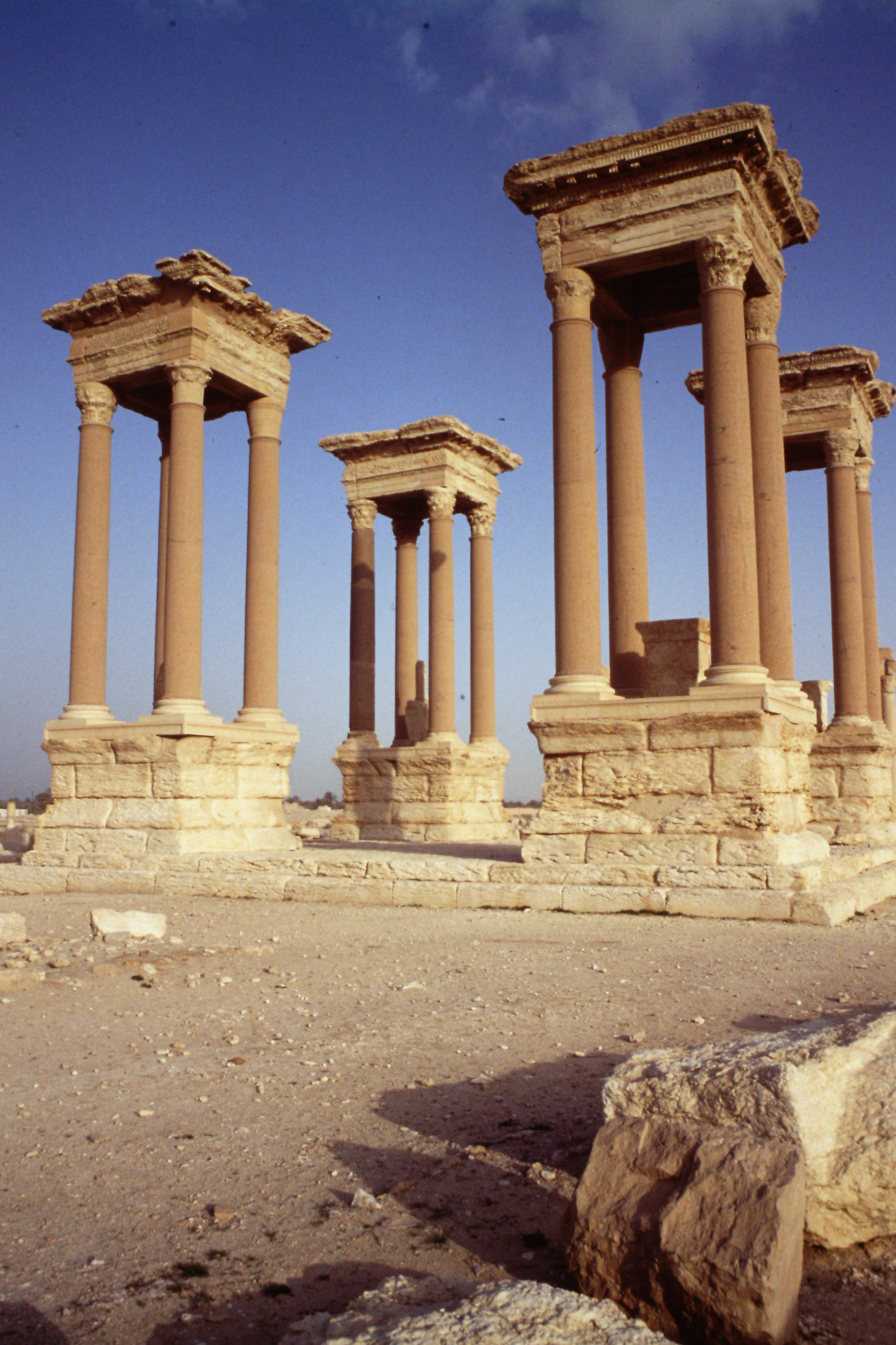 Tetrapilo